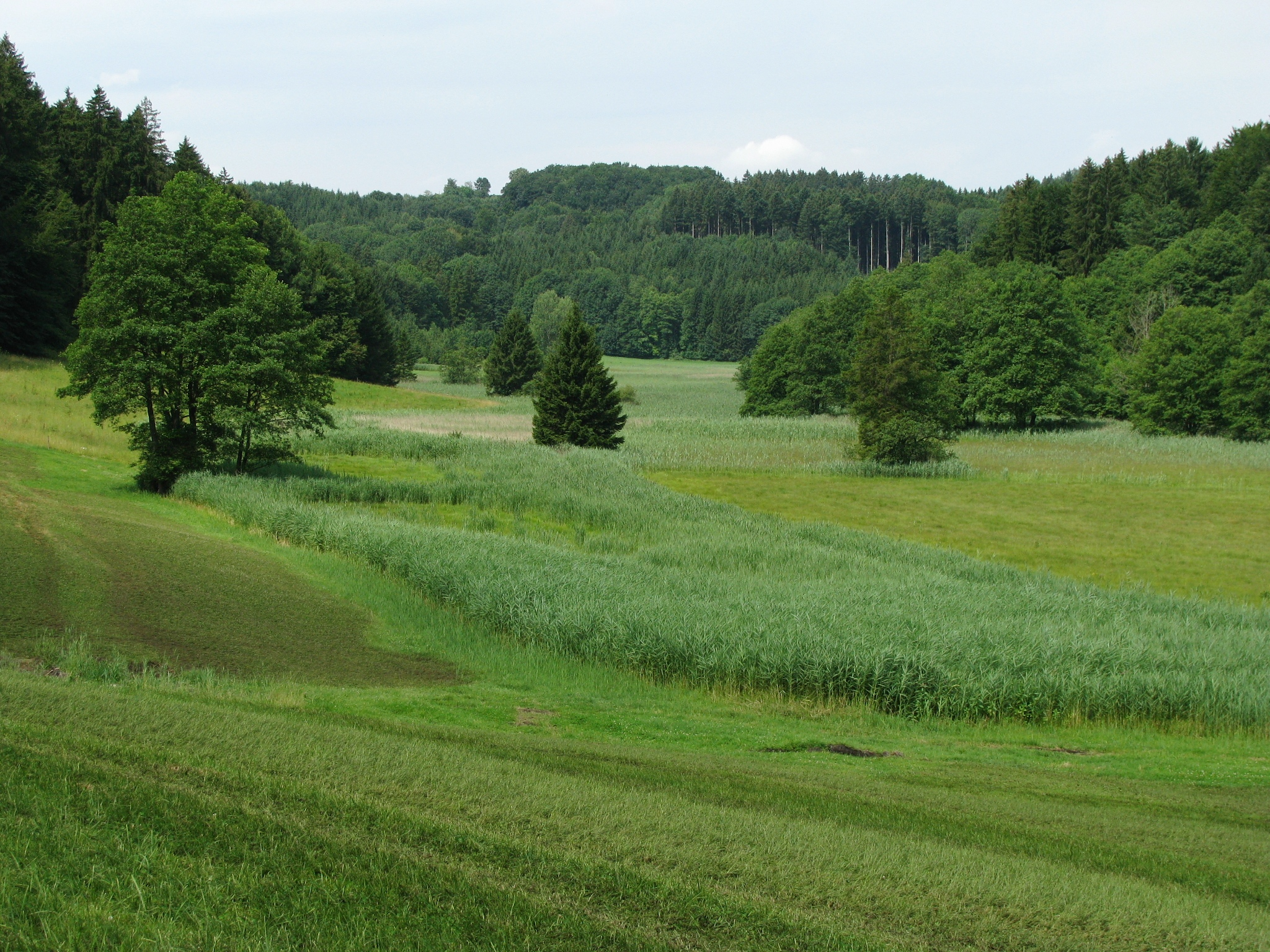 Kupferbachtal zwischen Oberstetten und Kaps